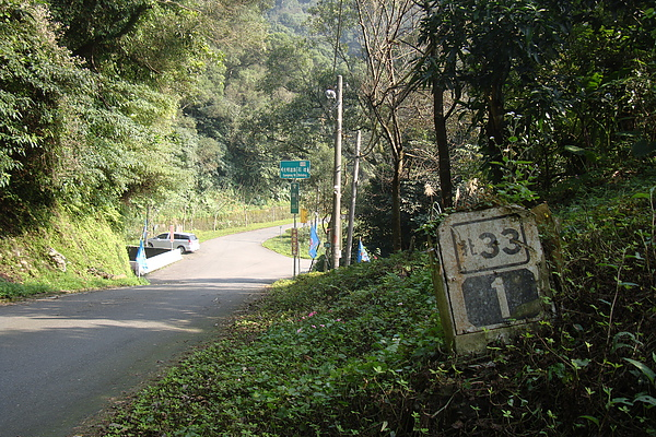 北33線景觀